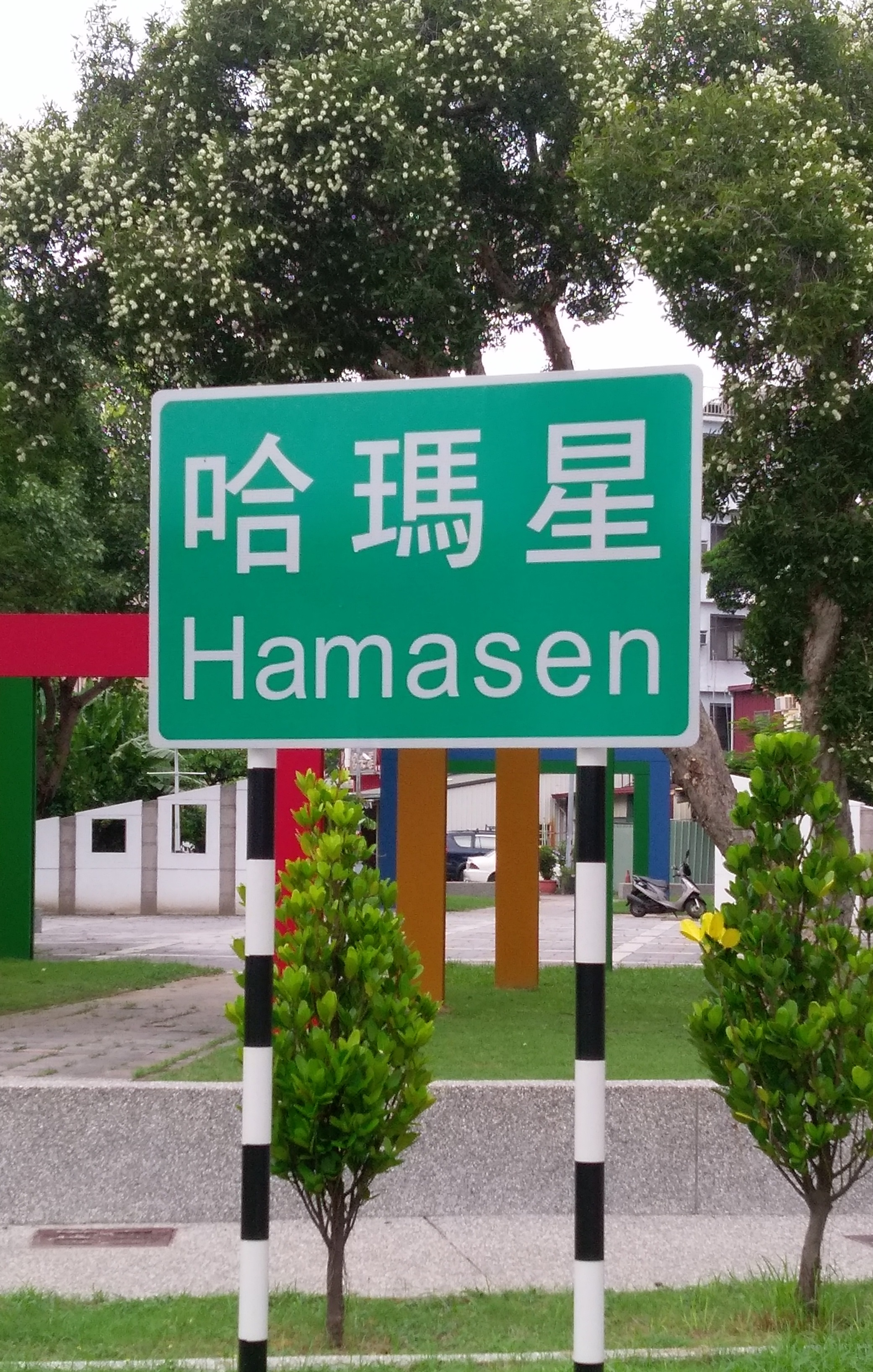 中文（台灣）: 位於鼓山三角公園內的哈瑪星地名告示牌